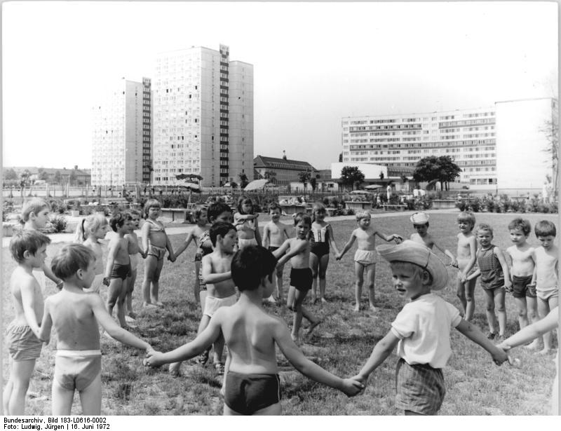 Erfurt, Neubaugebiet Johannesplatz, Wohnblocks, Wohnhochhaus ADN-ZB Ludwig-16.6.72 Erfurt: Vorbereitung auf die iga. Das neue Wohnzentrum am Johannisplatz in Erfurt besitzt großzügige Kindereinrichtungen. Ebenso wie im historischen Zentrum werden in- und ausländische Besucher der Internationalen Gartenbauausstellung auch in den Neubauvierteln der Blumstadt viel Interessantes entdecken. (vergl. L0616-1+3N) Information added by Wikimedia users. Die Hochhäuser sind vom Plattenbau-Typ Punkthaus Wohnbaureihe Erfurt (WBR Erfurt). Entwickelt 1969 vom VE Wohnungsbaukombinat Erfurt, Entwurf: Gert Widder, Günther Hähndel, Käthe Schul, Lutz Braumbach